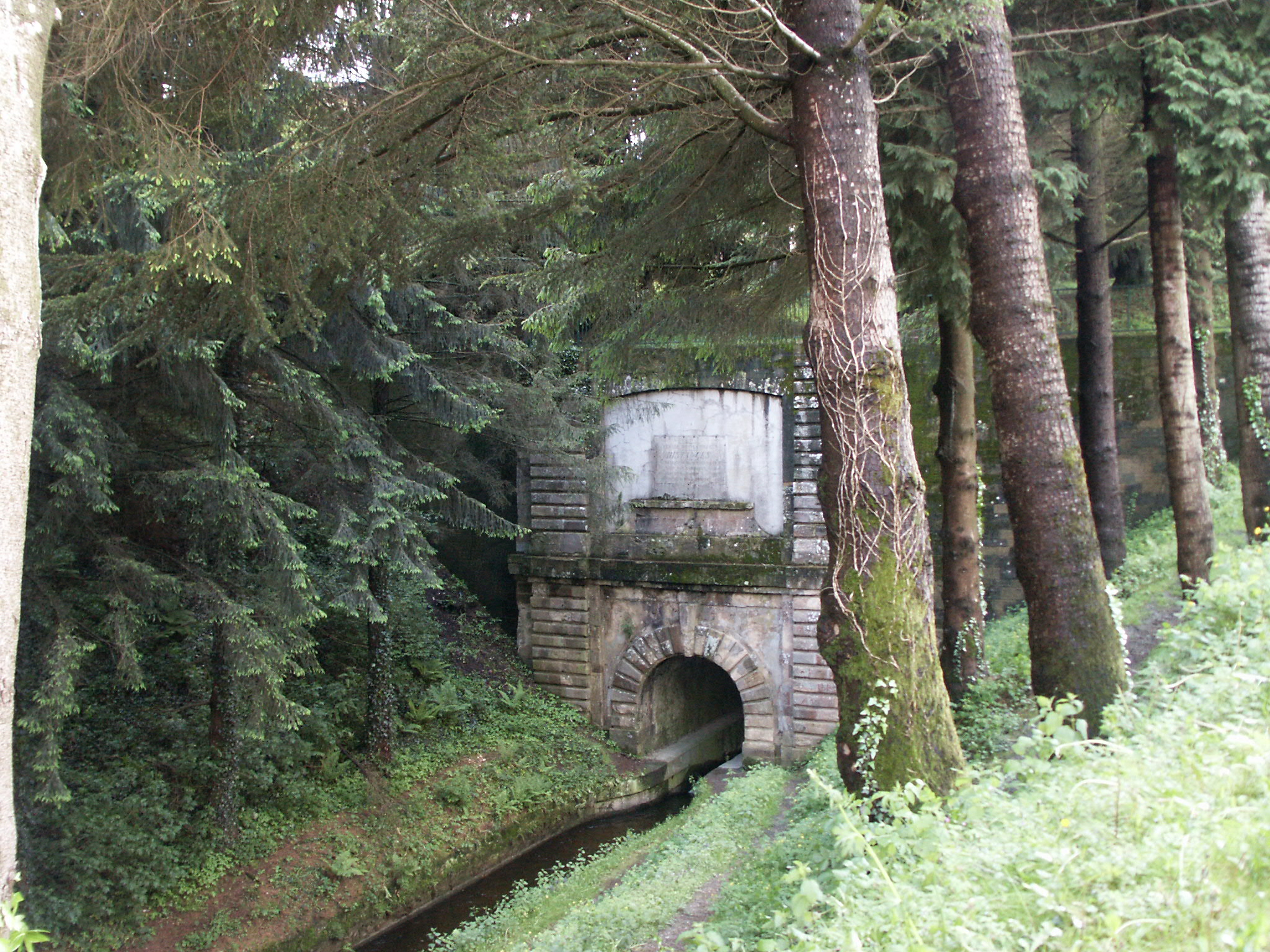 La voûte Vauban, sortie nord, en 2002